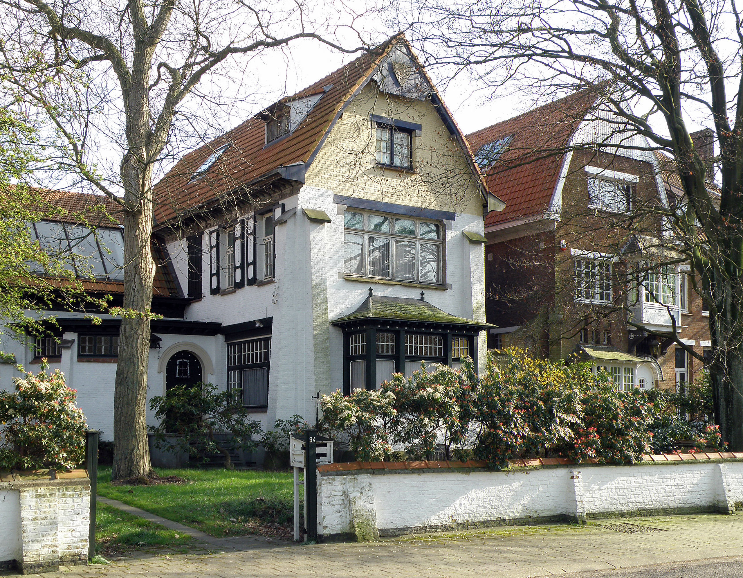 Mortsel bij Antwerpen (België). Landhuizen gelegen aan de Kapellelei, archit. Flor Van Reeth, anno 1909. In beeld: links, huis nr. 34, Villa Greta; rechts, nr. 32, De Witte Vaas.